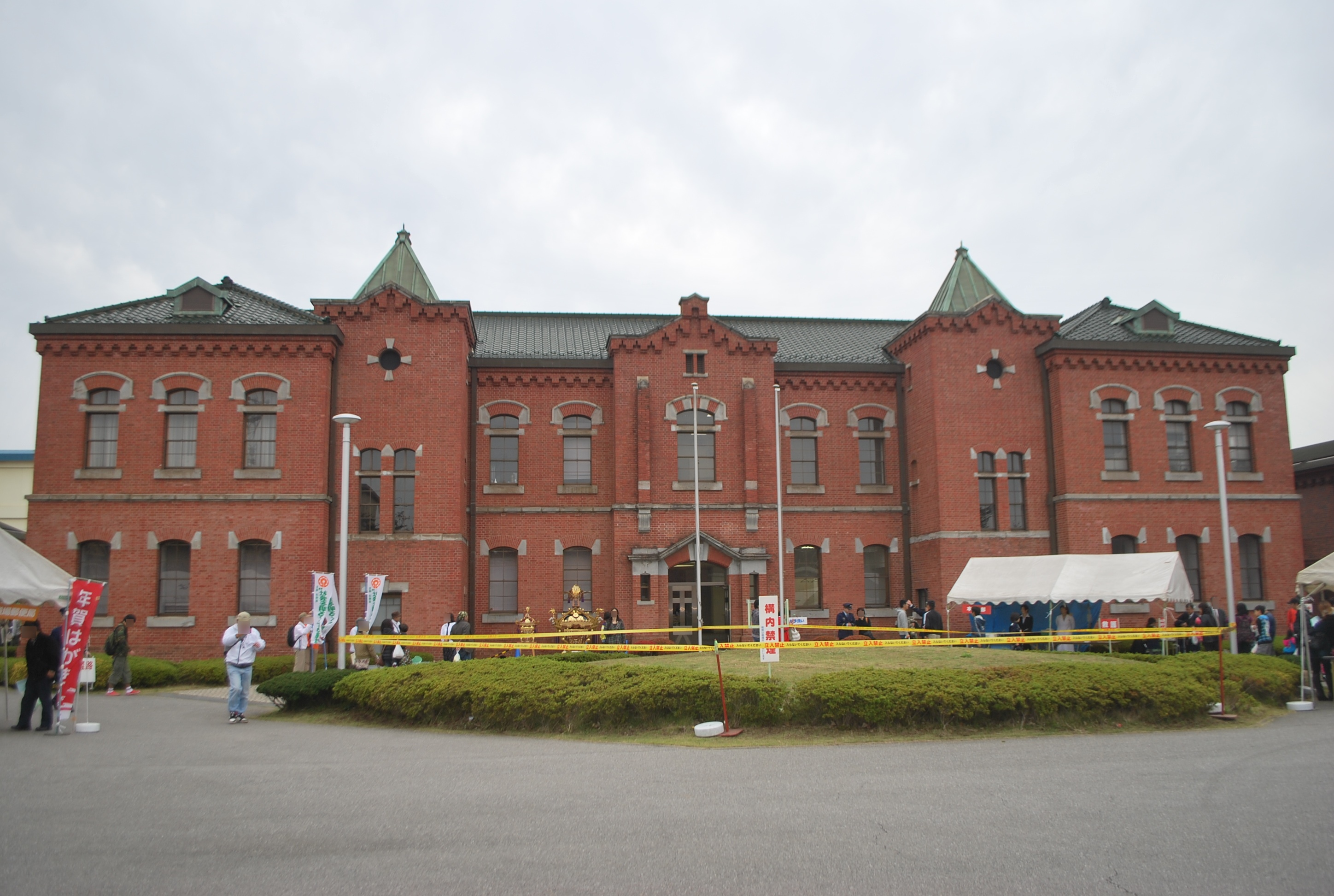 千葉刑務所本館。1907年竣工。千葉市。